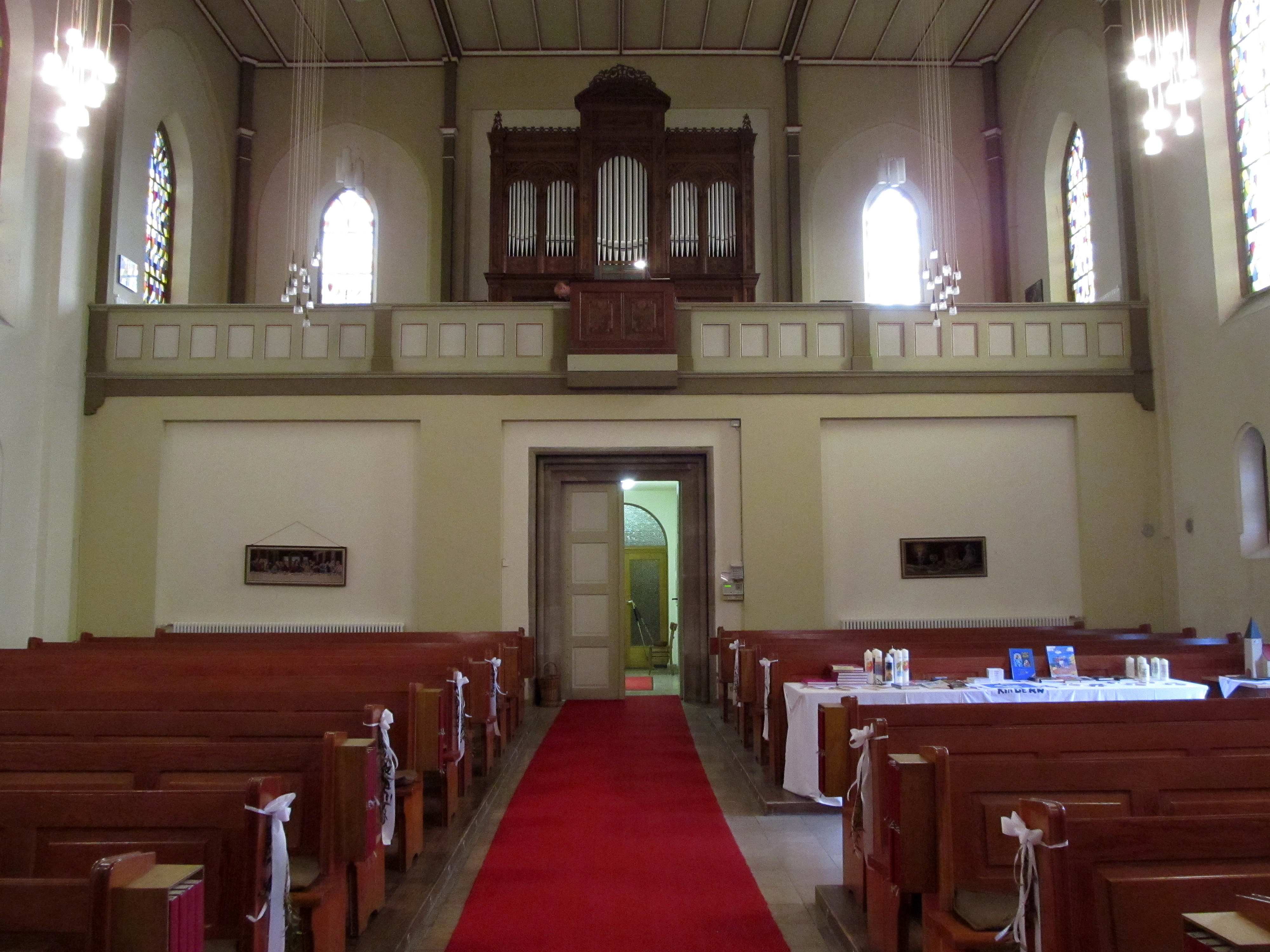 Blick ins Innere der protestantischen Martin-Luther-Kirche in Webenheim, einem Stadtteil von Blieskastel, Saarland